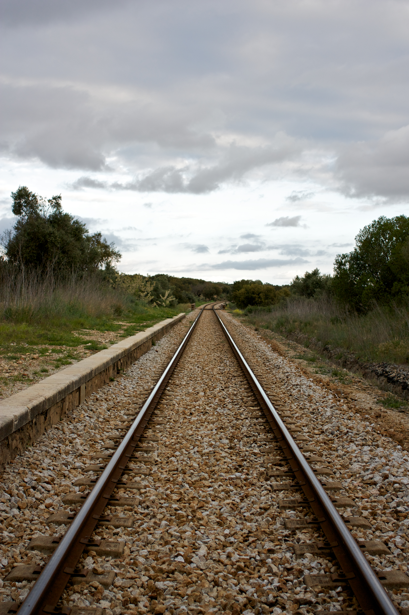 Via férrea: Linha do Alentejo [PK 83] Local: Apeadeiro de Escoural Data e hora: 13 de Abril de 2009 [19h04] Sentido: Funcheira